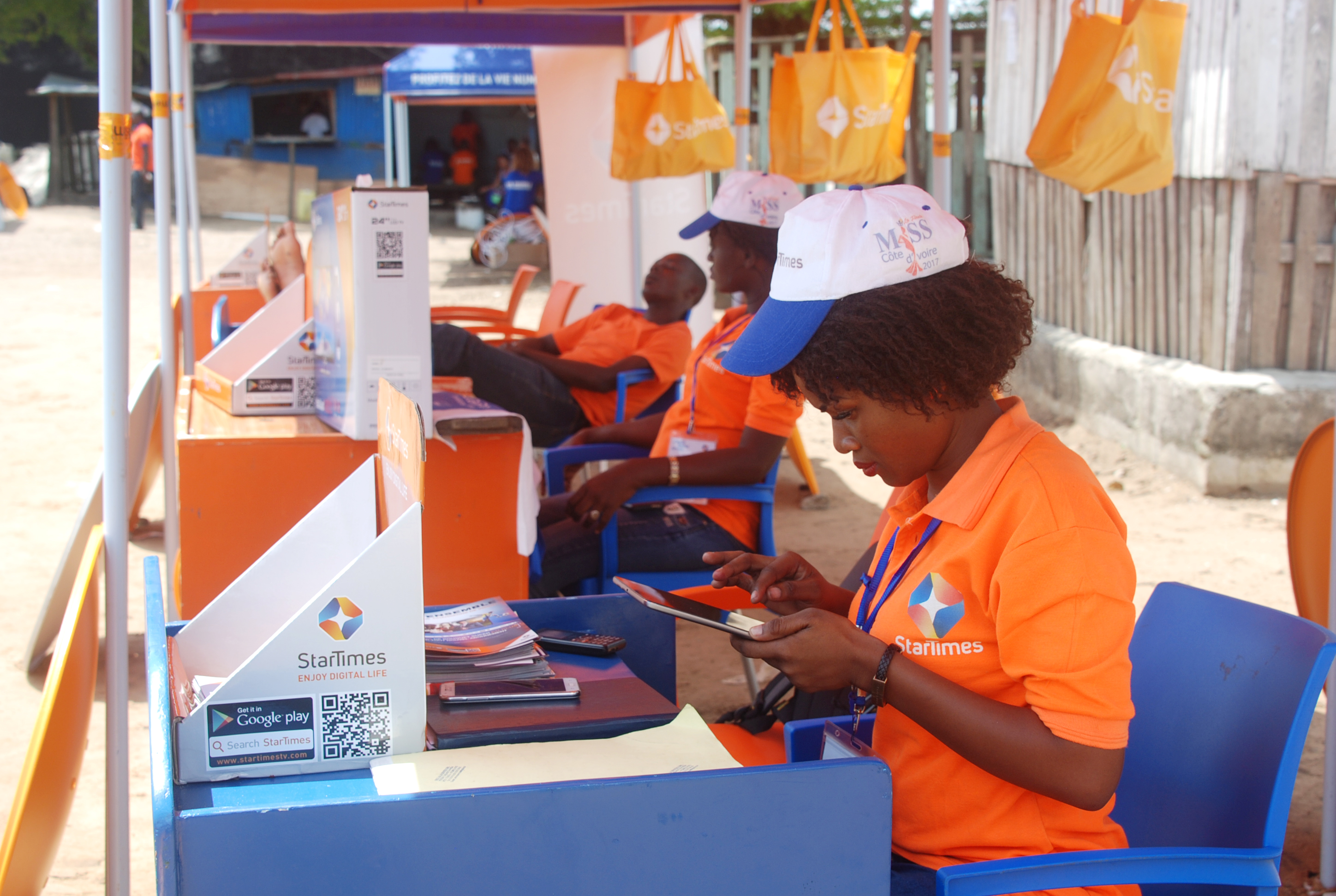 Une commerciale assise à un stand à Abidjan. This is an image of "African people at work" from Ivory Coast